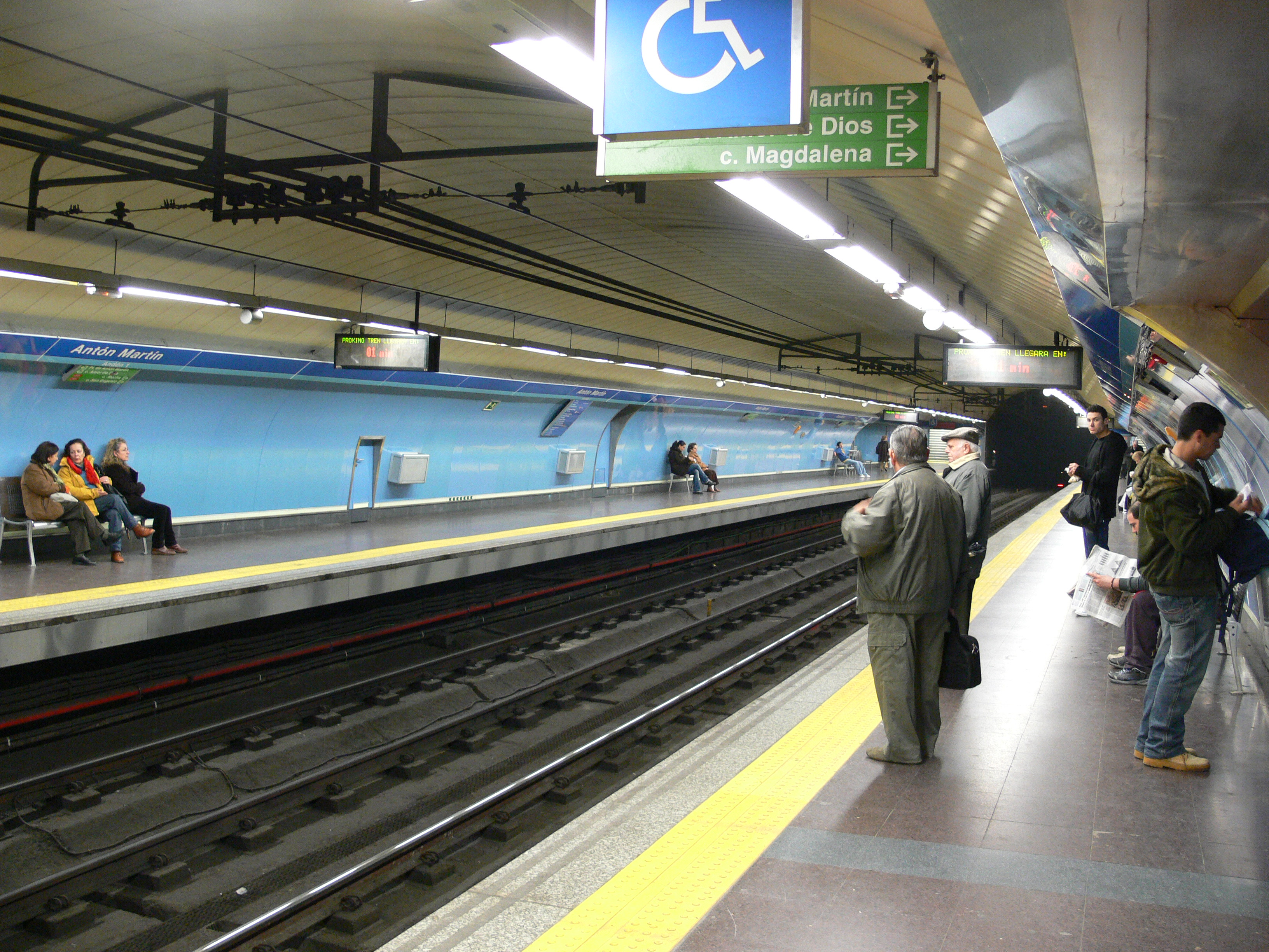 Estación Antón Martín